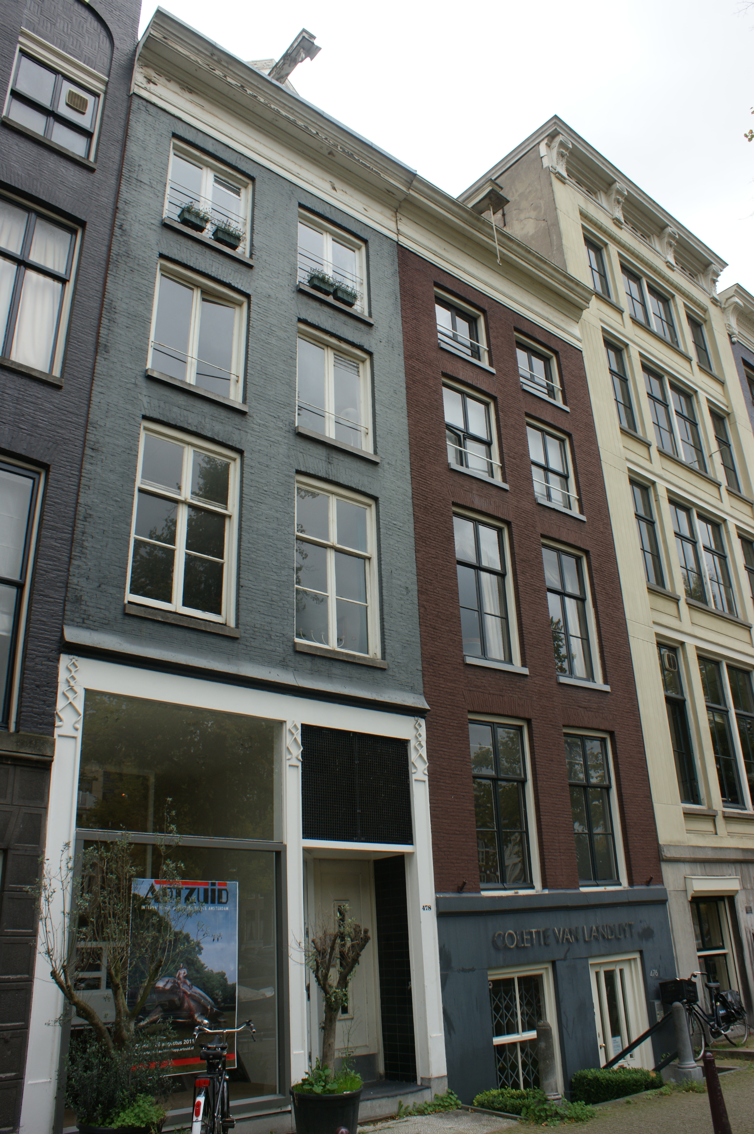 Amsterdam, Keizersgracht